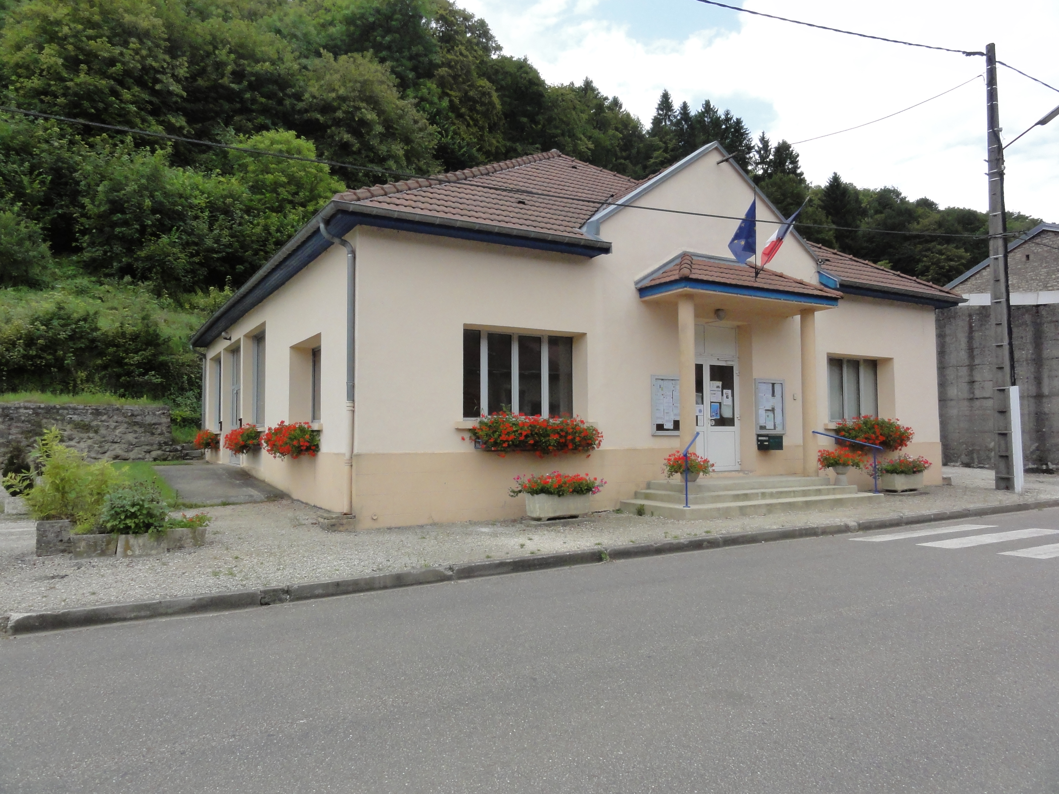 Montplonne (Meuse) mairie